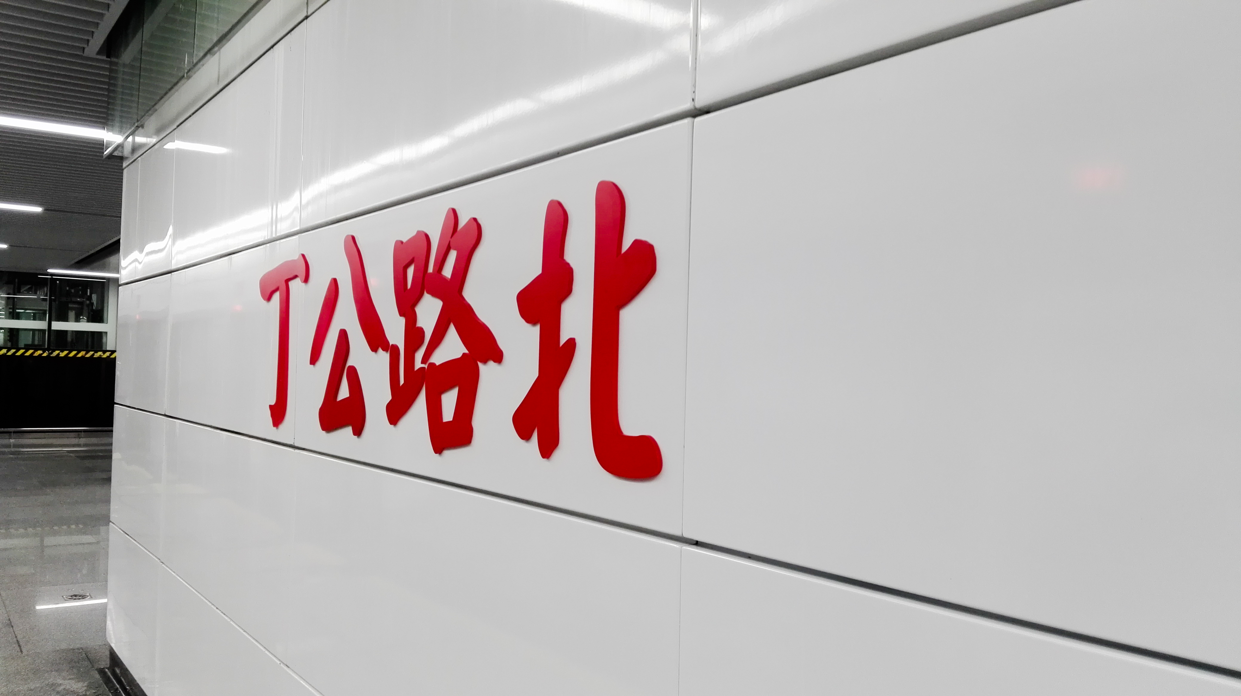 丁公路北站